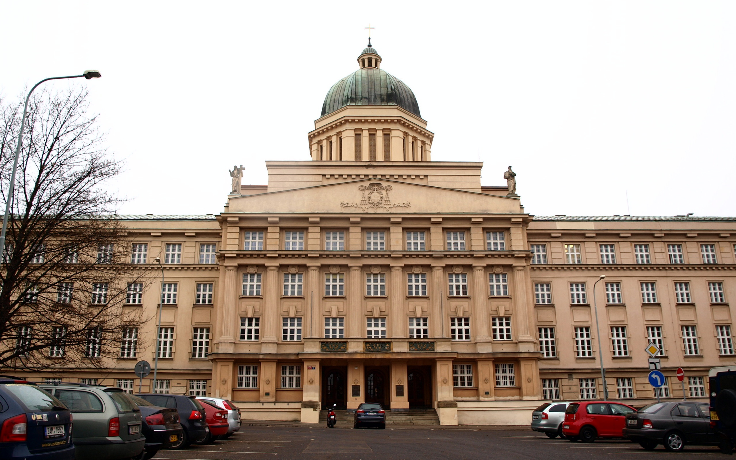 Praha 6 Dejvice, Arcibiskupský seminář